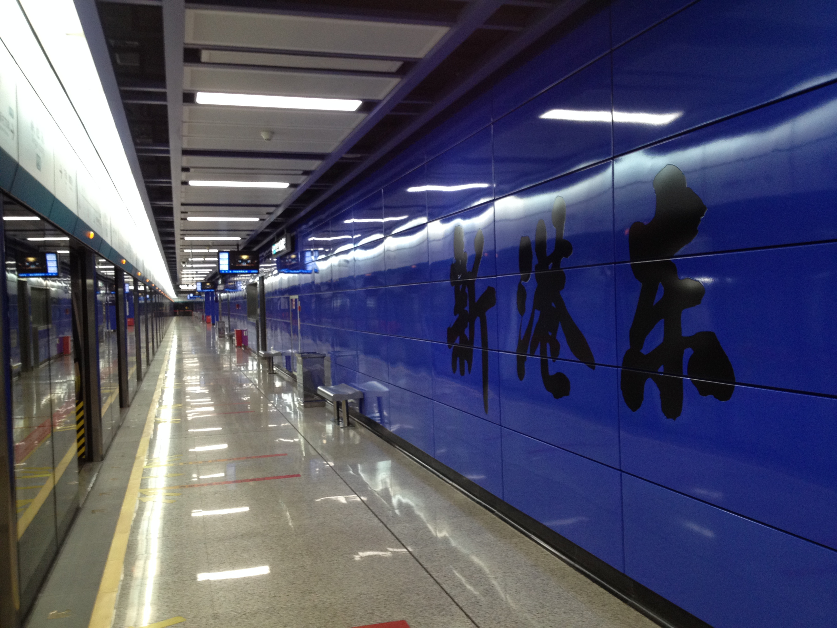 广州地铁新港东站月台（凤凰新村方向）